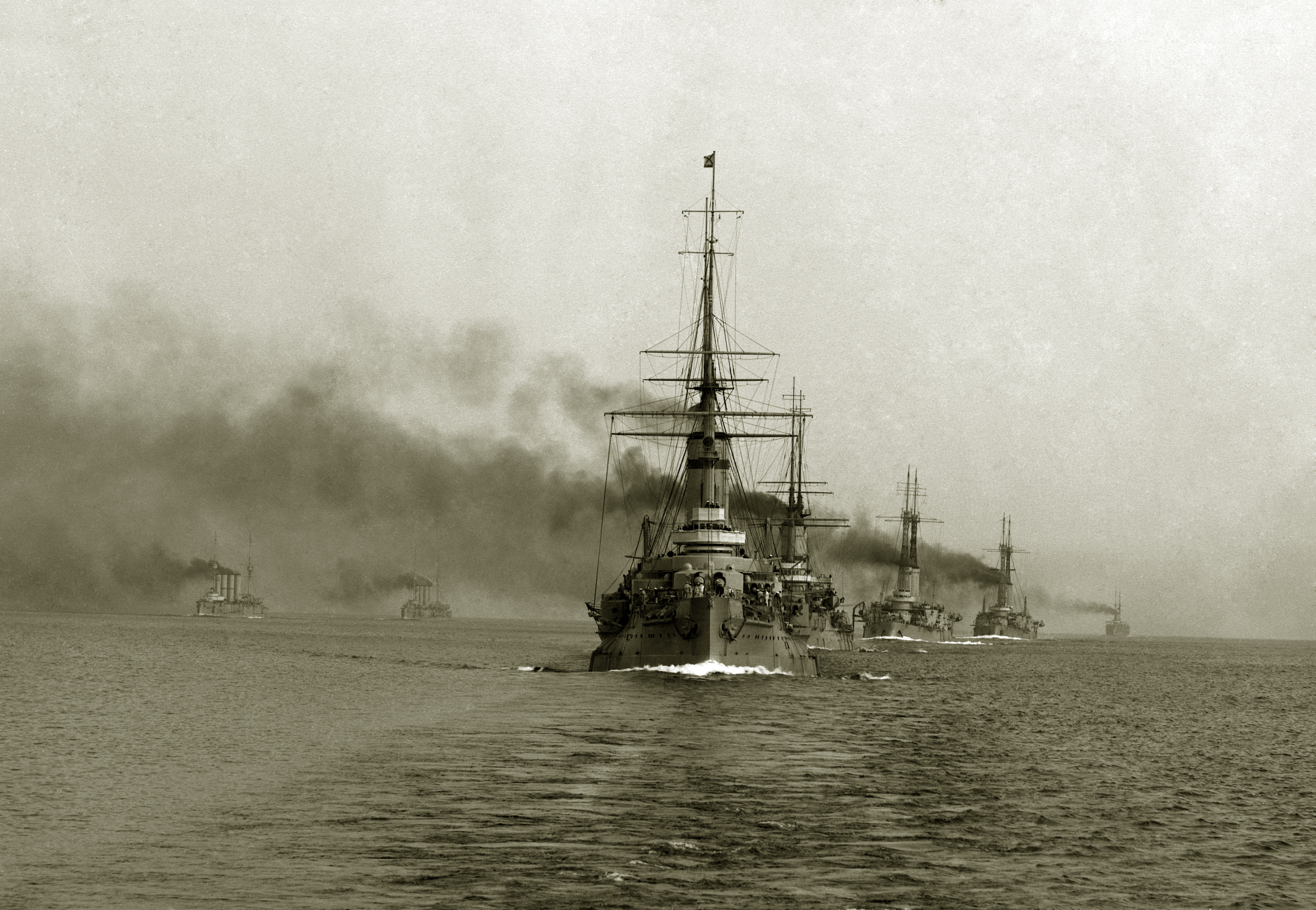 Вторая бригада линкоров эскадры линейных кораблей Балтийского флота: («Цесаревич», «Слава», «Андрей Первозванный», «Император Павел I») под флагом вице-адмирала Кербера